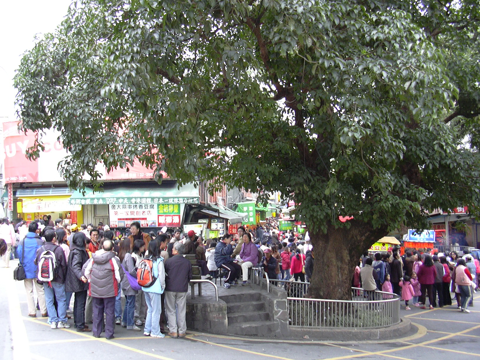 台北深坑巨木。